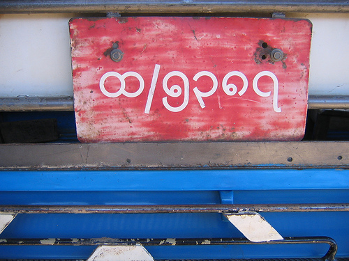 Ecriture birmane